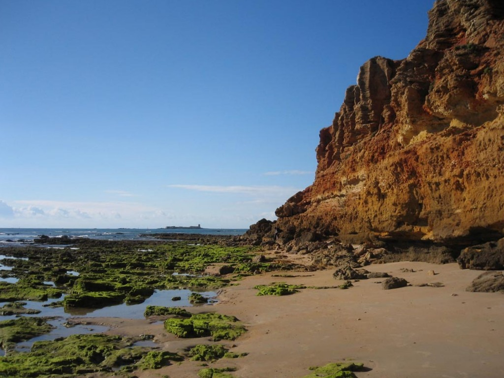 Vista del Islote de Sancti Petri desde de la playa de Chiclana de la Frontera